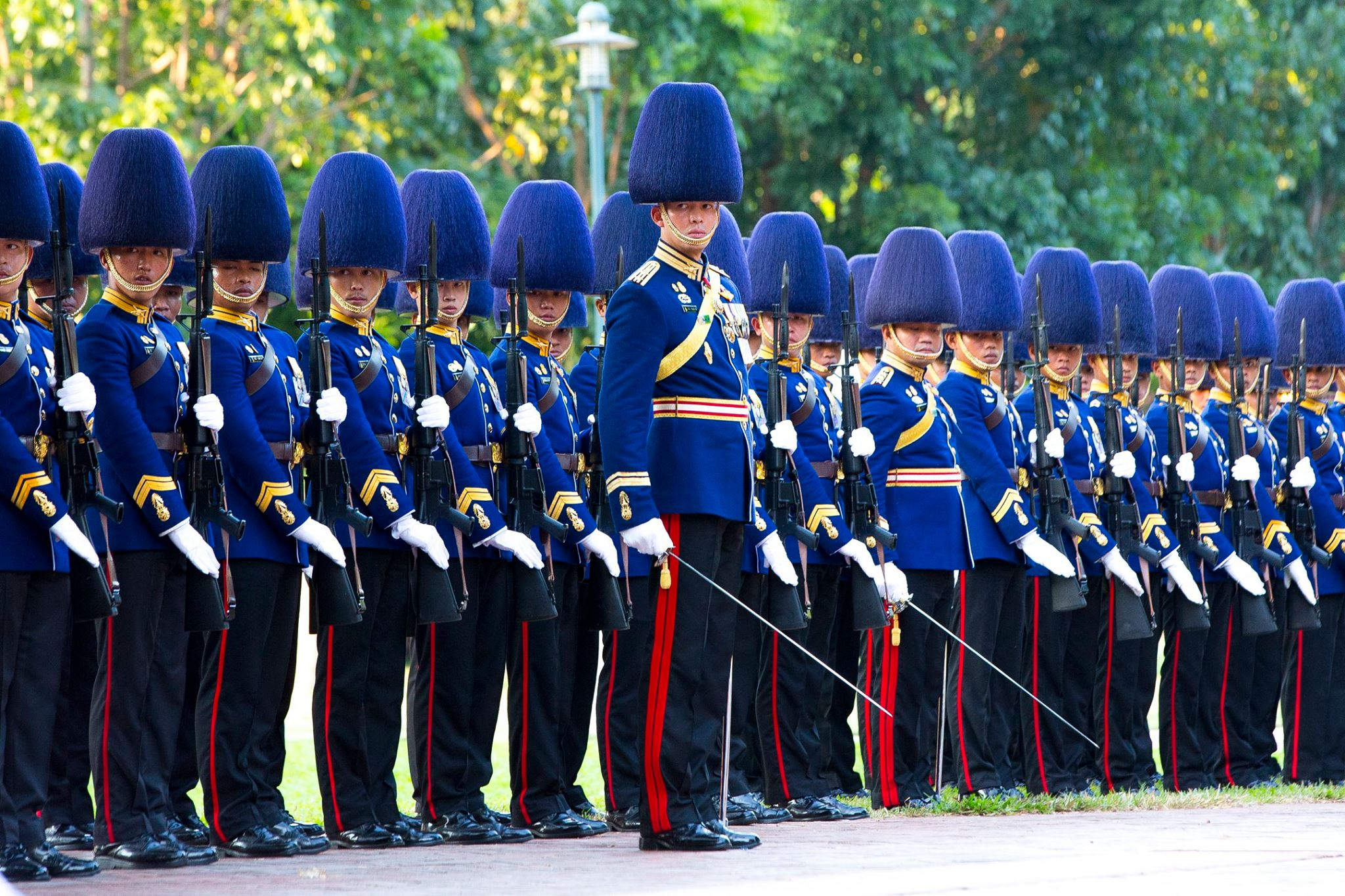 11th Infantry Regiment, King's Guard.